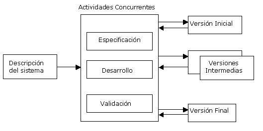 Esquema general de un proceso Evolutivo Incremental utilizado para el ciclo de vida y desarrollo del software